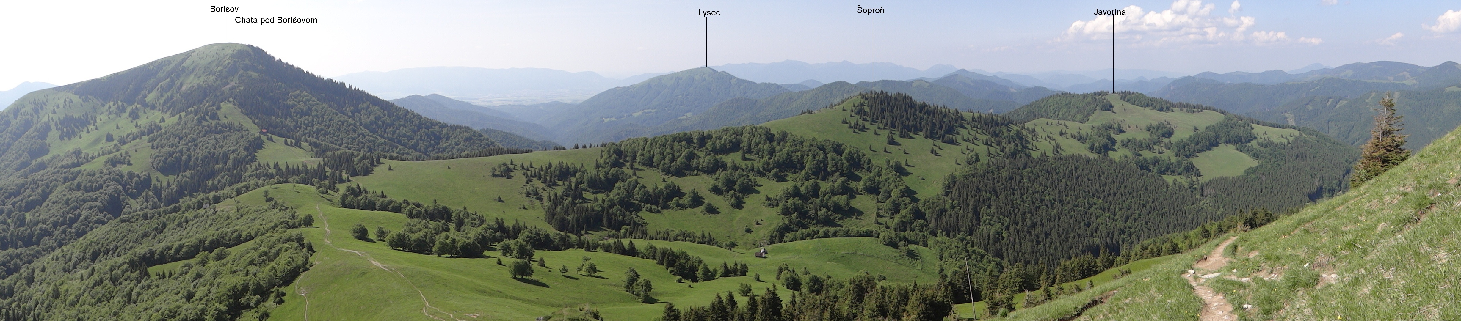 View from Ploská